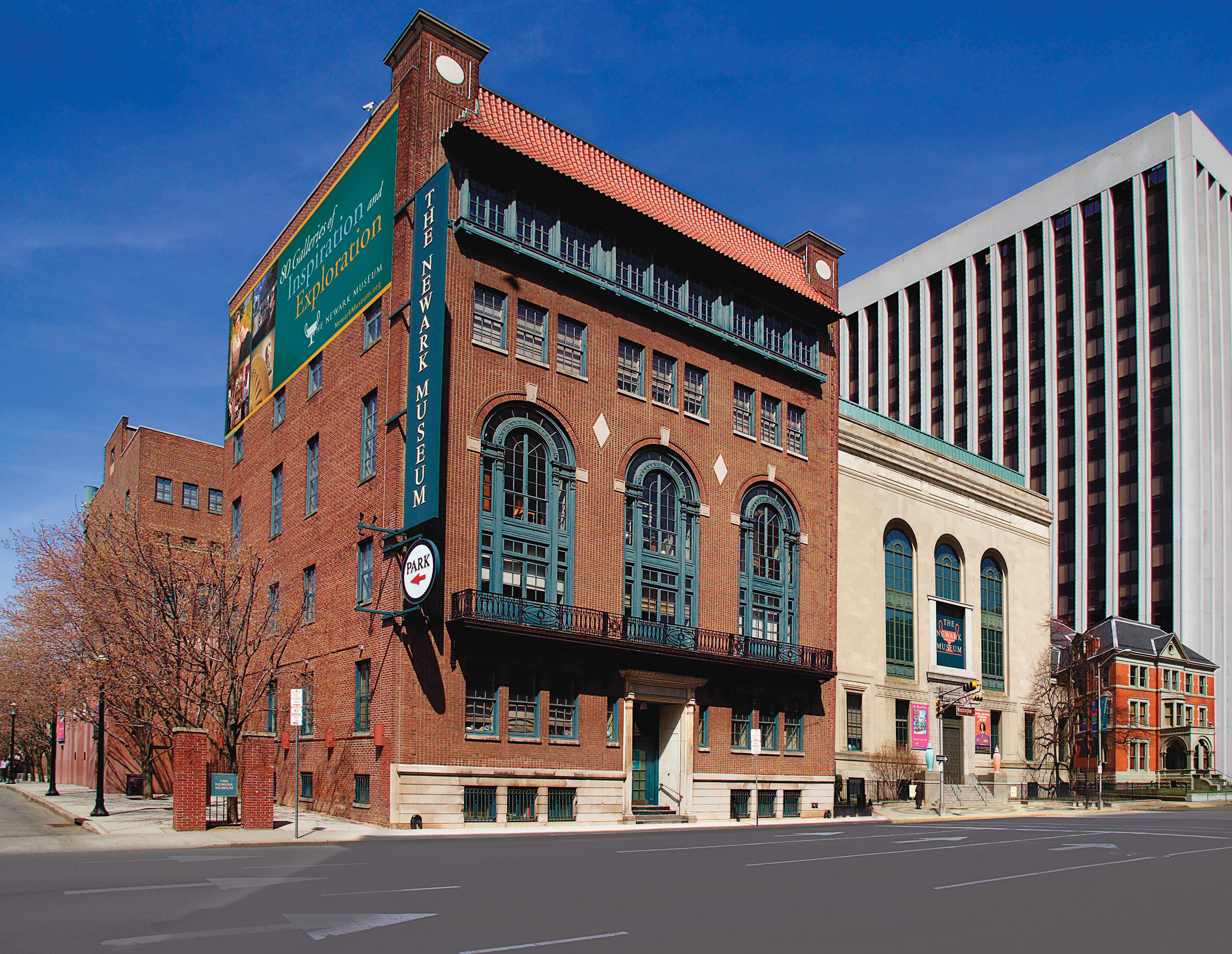 Newark Museum Facade